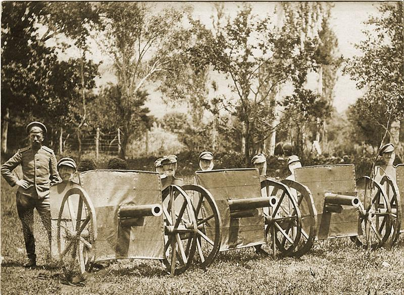 Поддельные орудия. Русско-турецкий фронт